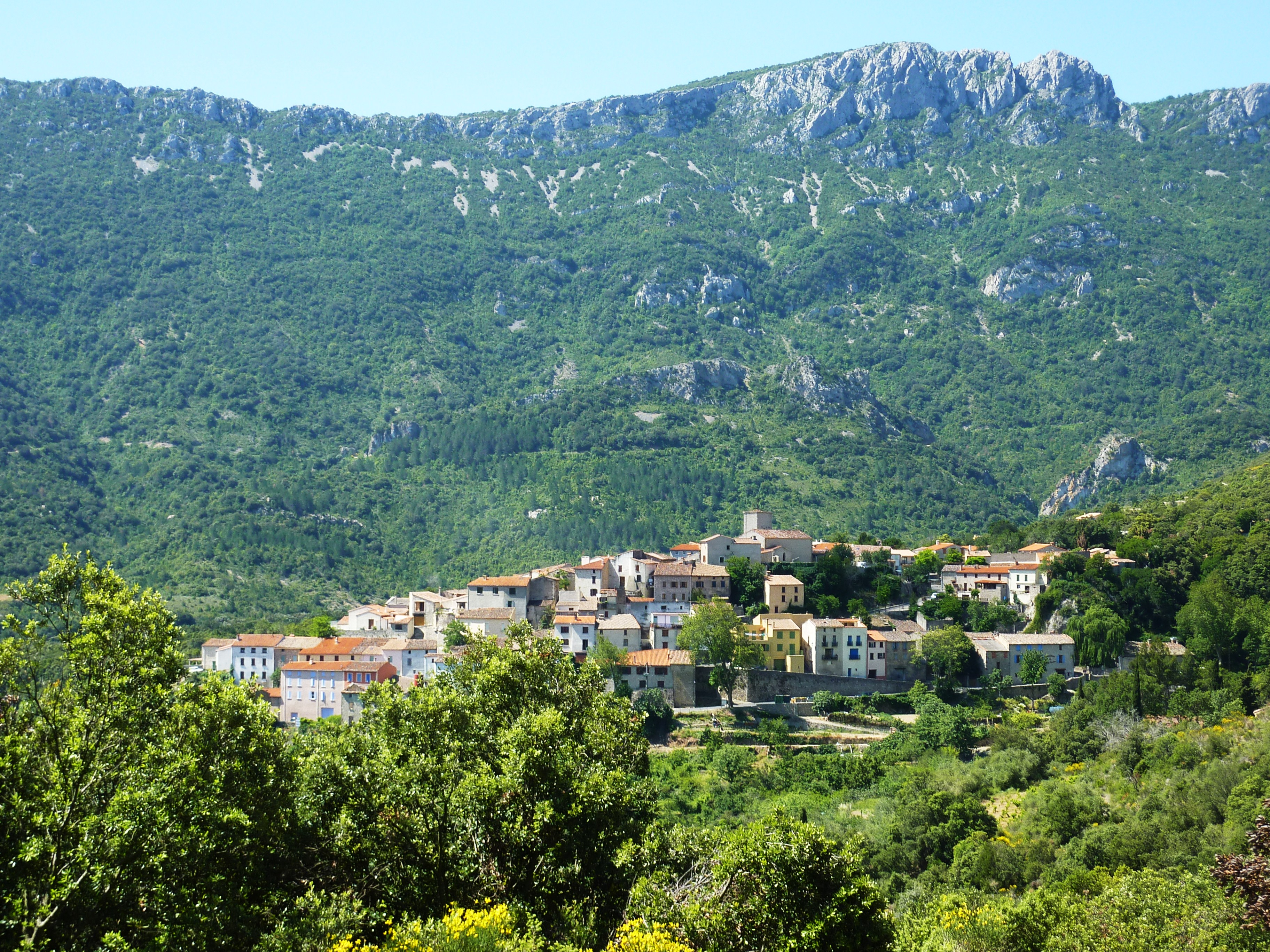 Duilhac-sous-Peyrepertuse: le village vu de la route montant au château cathare de Peyrertuse